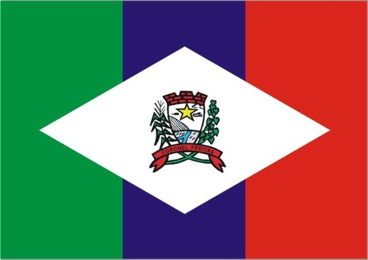 Drapeau de la municipalité de Coronel Freitas - Brésil